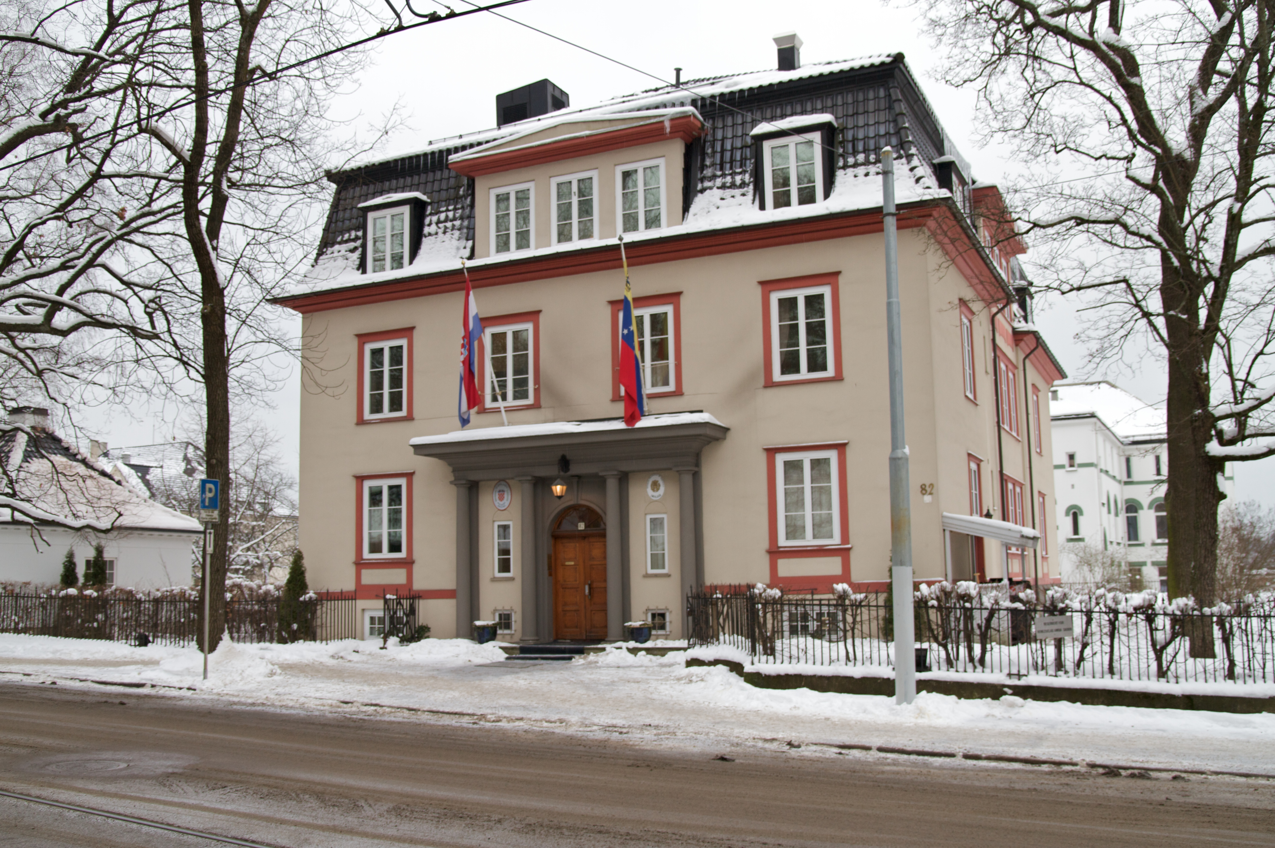 Drammensveien 82 i Oslo.